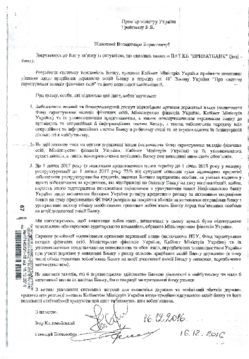 Лист І.Коломойського та Г.Боголюбова до Прем'єр-міністра України